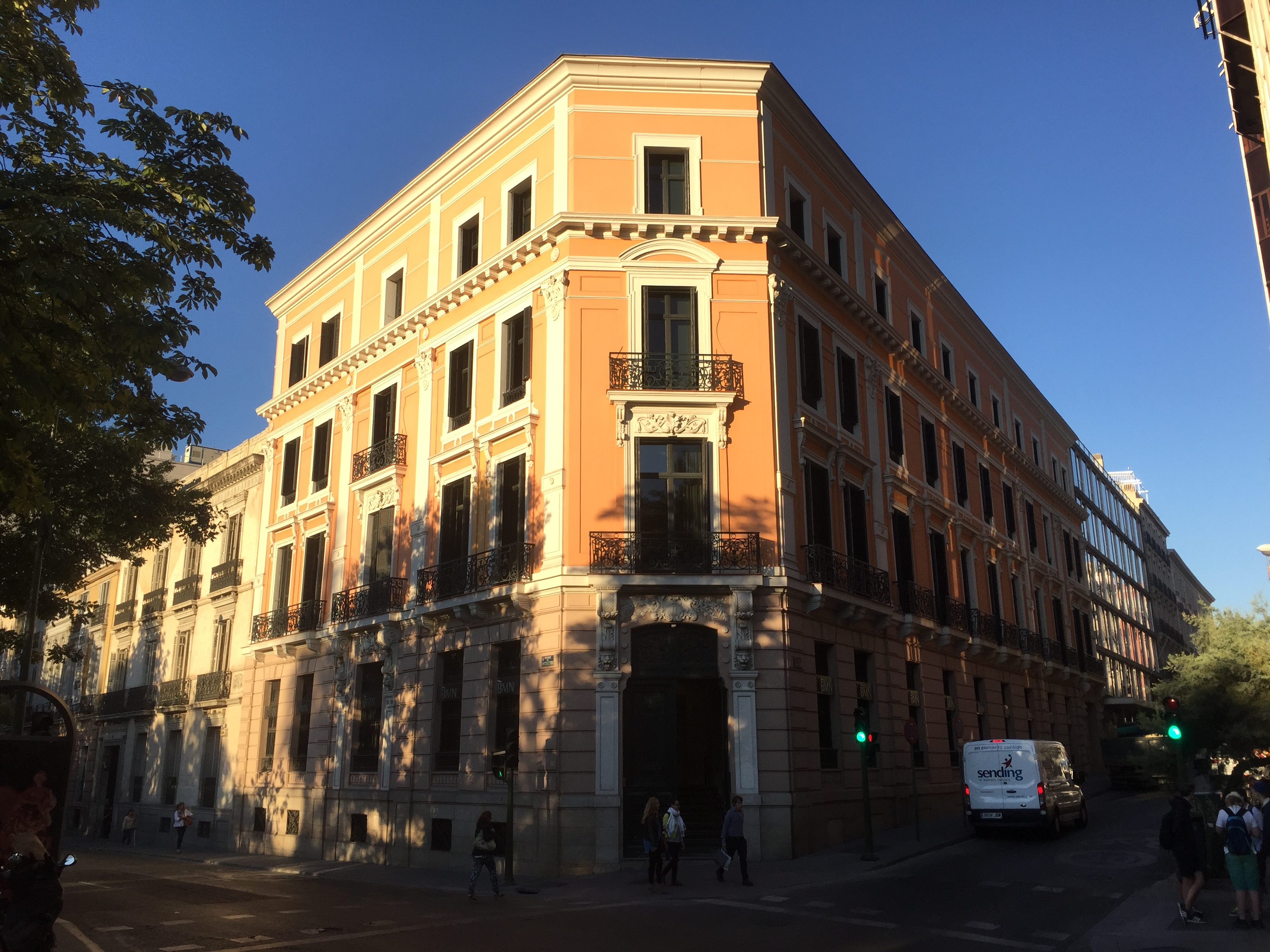 Edificio de la Sociedad de Crédito Mobiliario